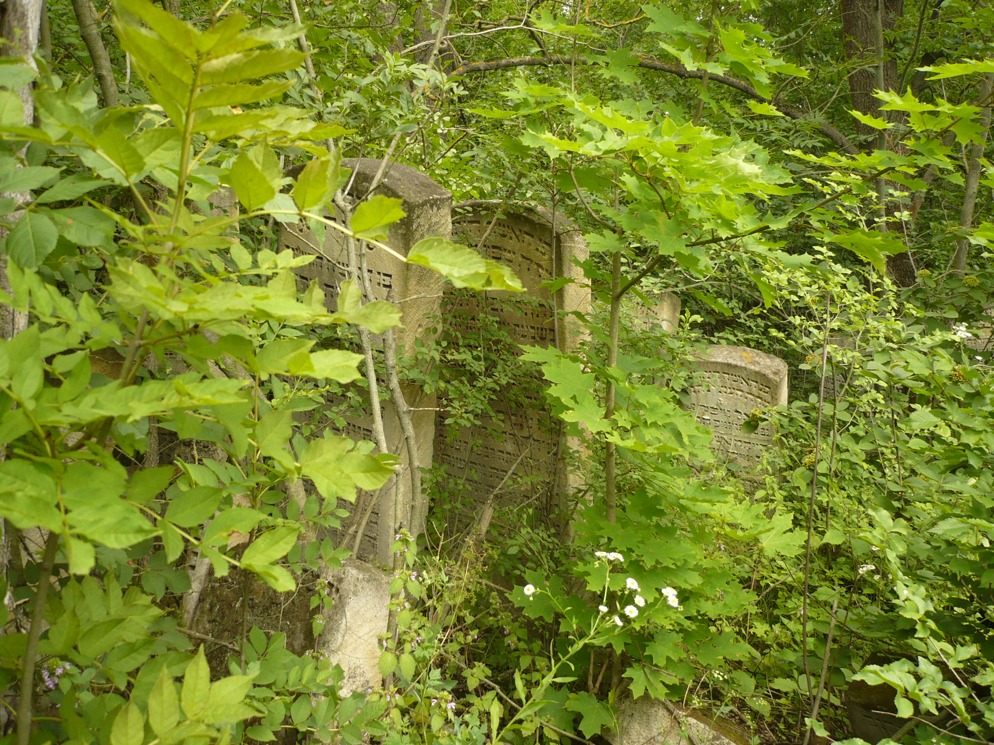 Buczacz.Kirkut